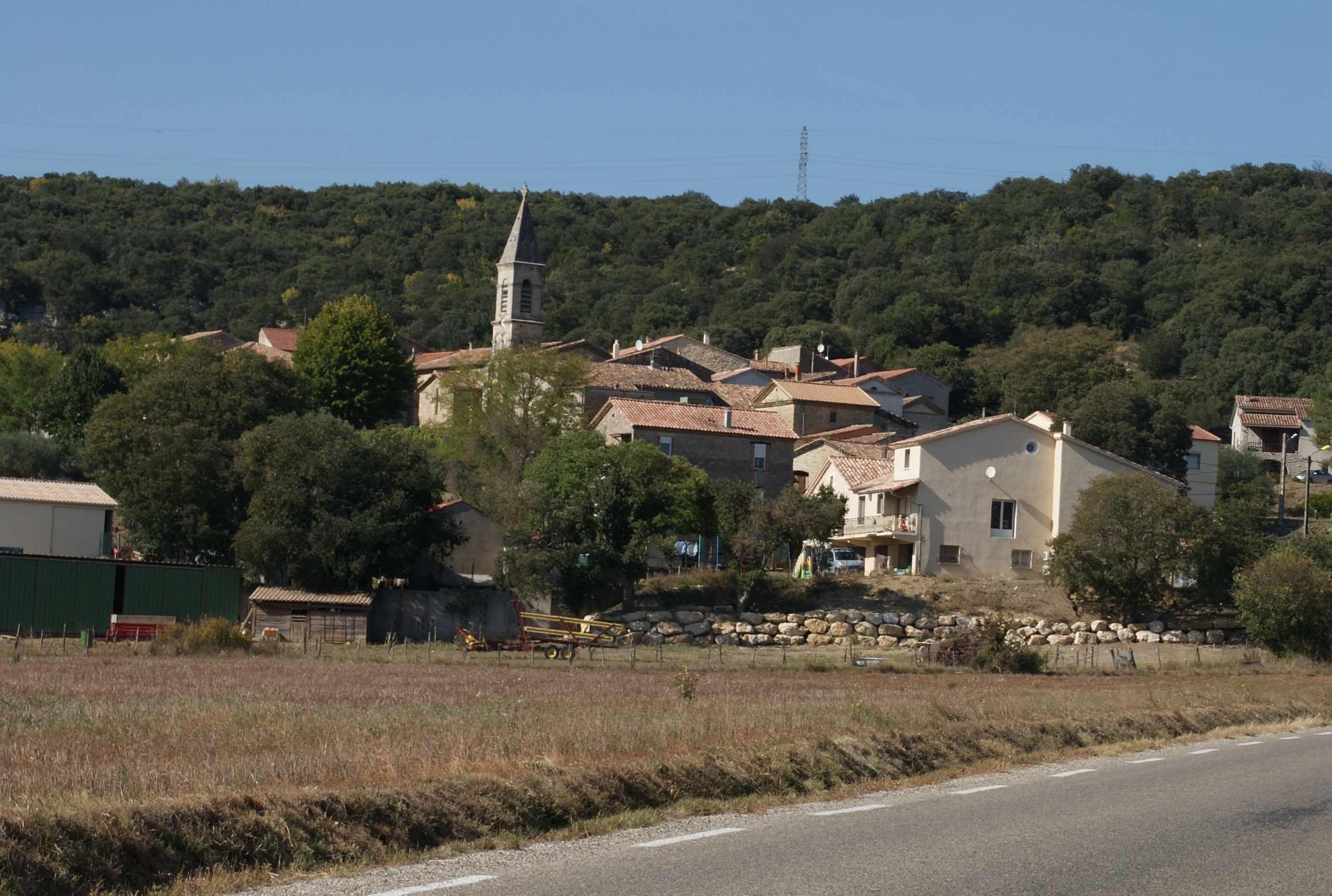 saint juli